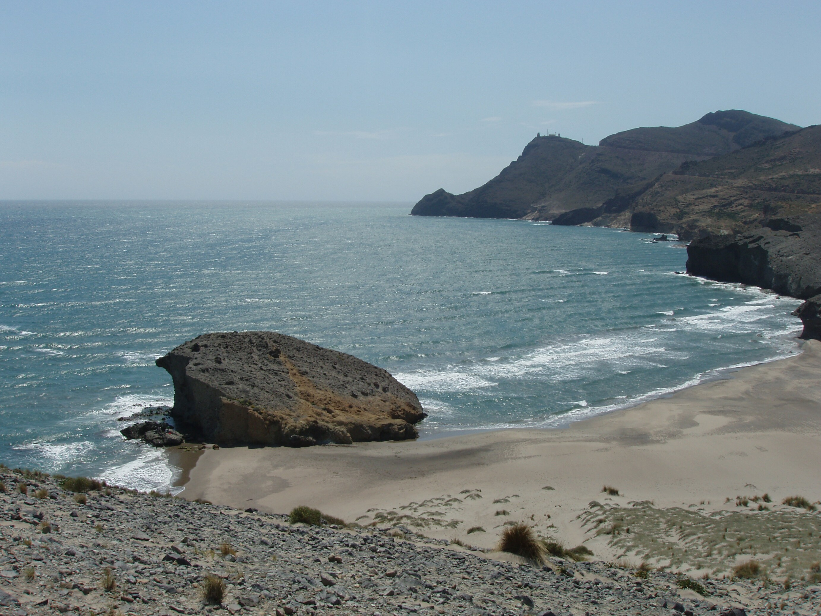 Die Playa De Monsul an der spanischen Mittelmeerküste östlich von Almeria